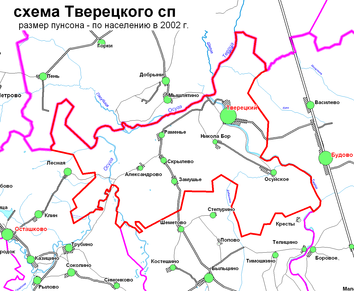 Схема Тверецкого сп в Торжокском р-не